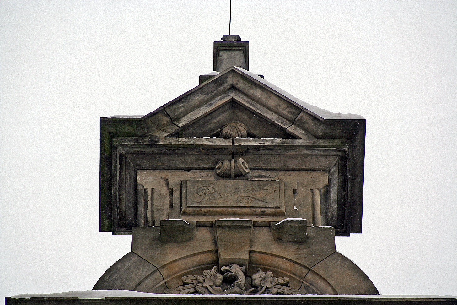 Autograf Richarda Plüddemanna zdobiący szczyt gmachu banku PKO przy ul. Gepperta we Wrocławiu